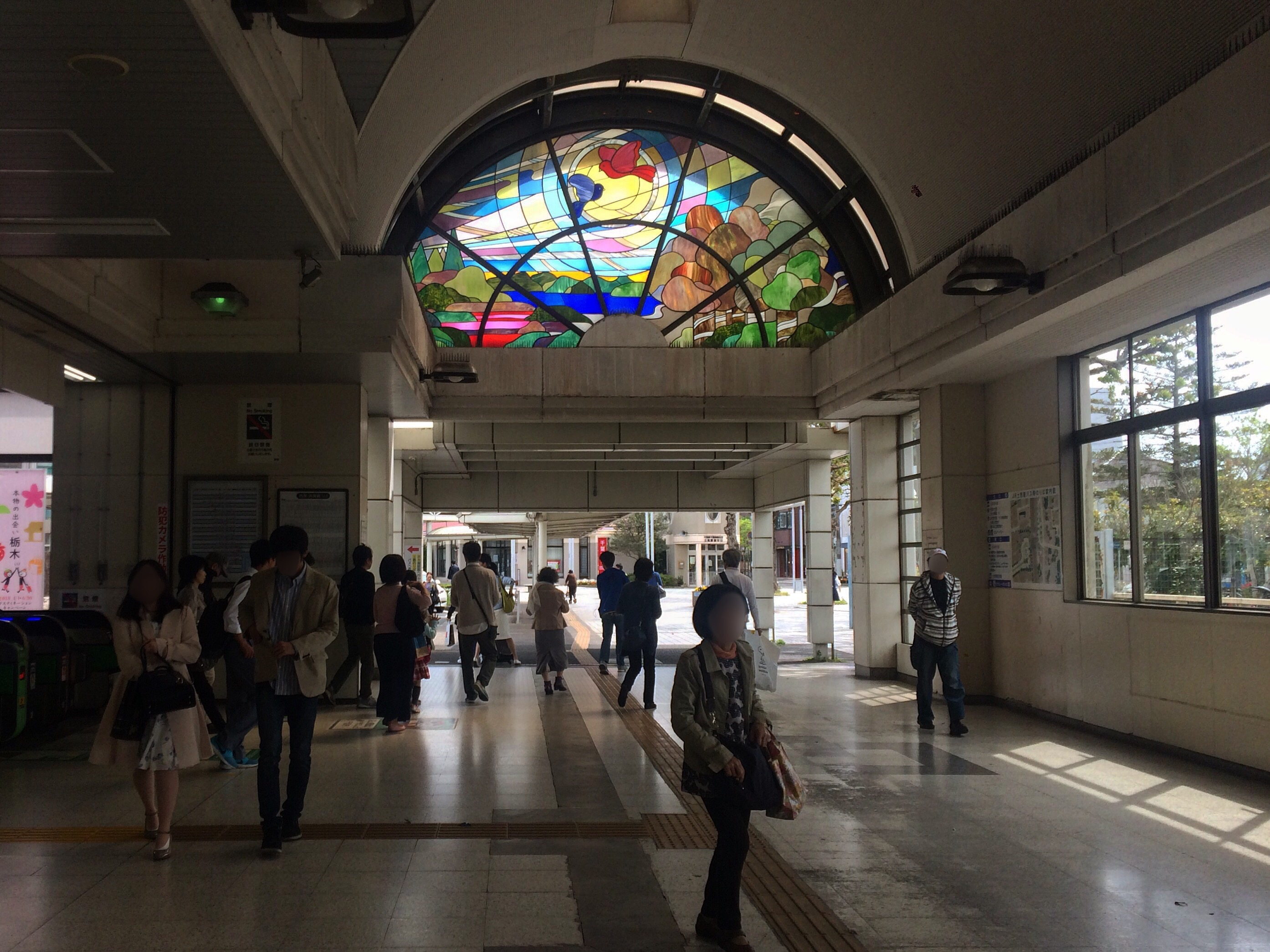 土気駅構内